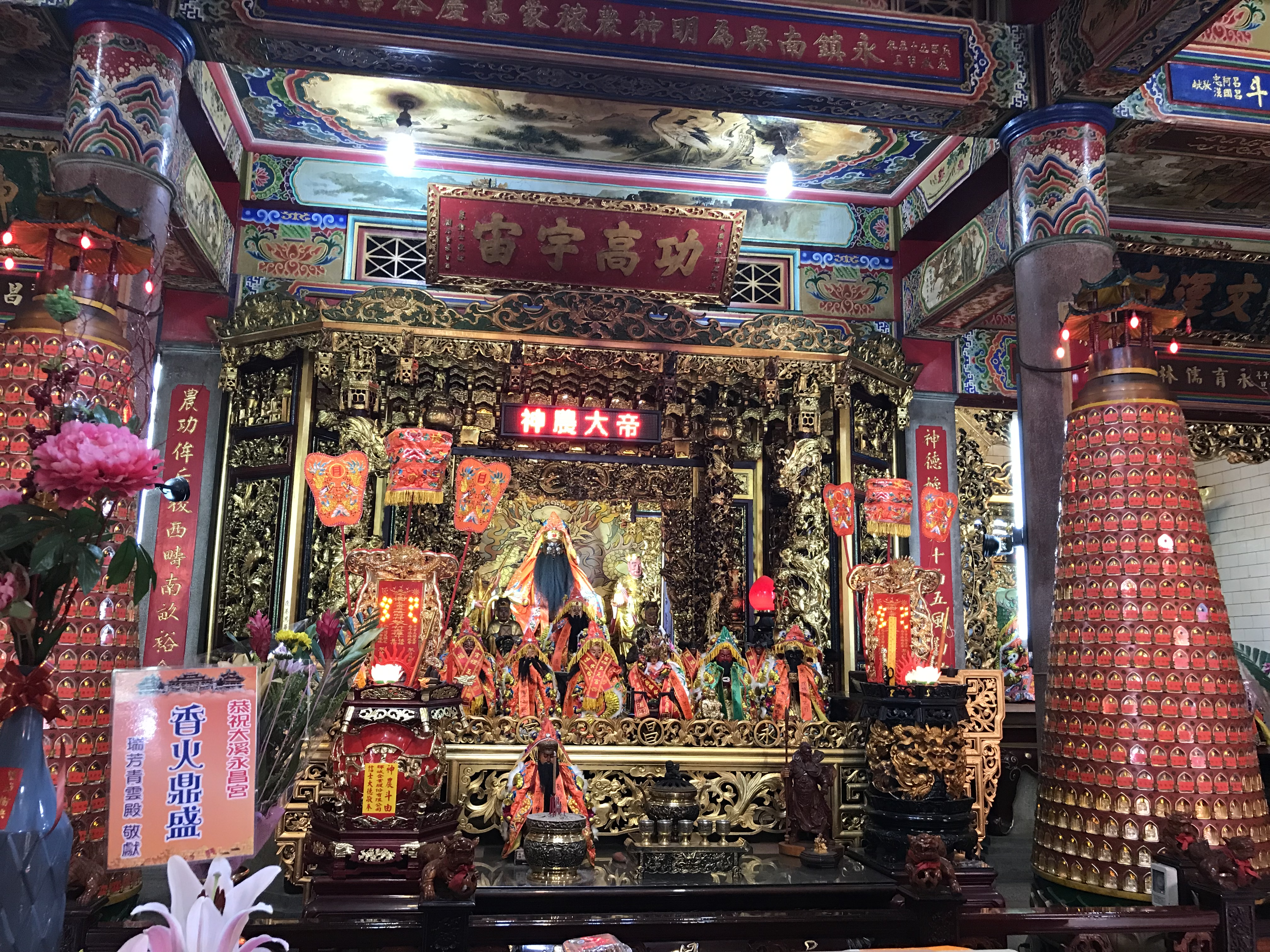 中文（台灣）: 大溪永昌宮神像